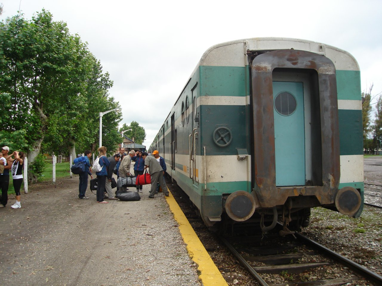 Tren de Ferrocentral que realiza el servicio Tucumán-Buenos Aires detenido en la estación Rafaela del Ferrocarril General Mitre de la red ferroviaria argentina. Rafaela, Santa Fe.